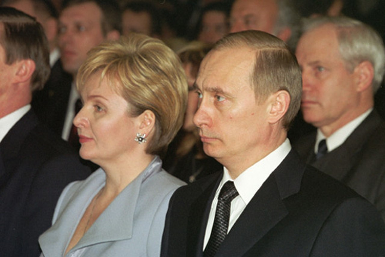 МОСКВА, ГОСУДАРСТВЕННЫЙ КРЕМЛЕВСКИЙ ДВОРЕЦ. С Людмилой Путиной во время торжественного вечера, посвященного Дню защитника Отечества.